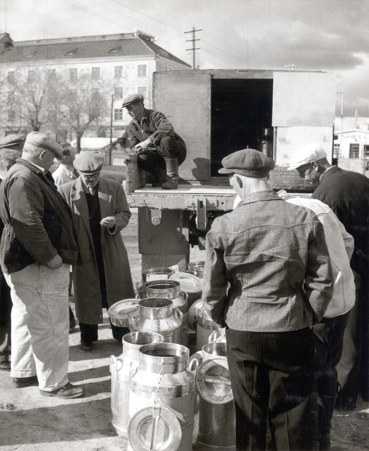 Maitopäniköitä (maitotonkkia) puretaan kuorma-autosta (tai lastataan) Tottintorilla. Taustalla näkyy Shell-huoltamo ja Miljoonatalo.